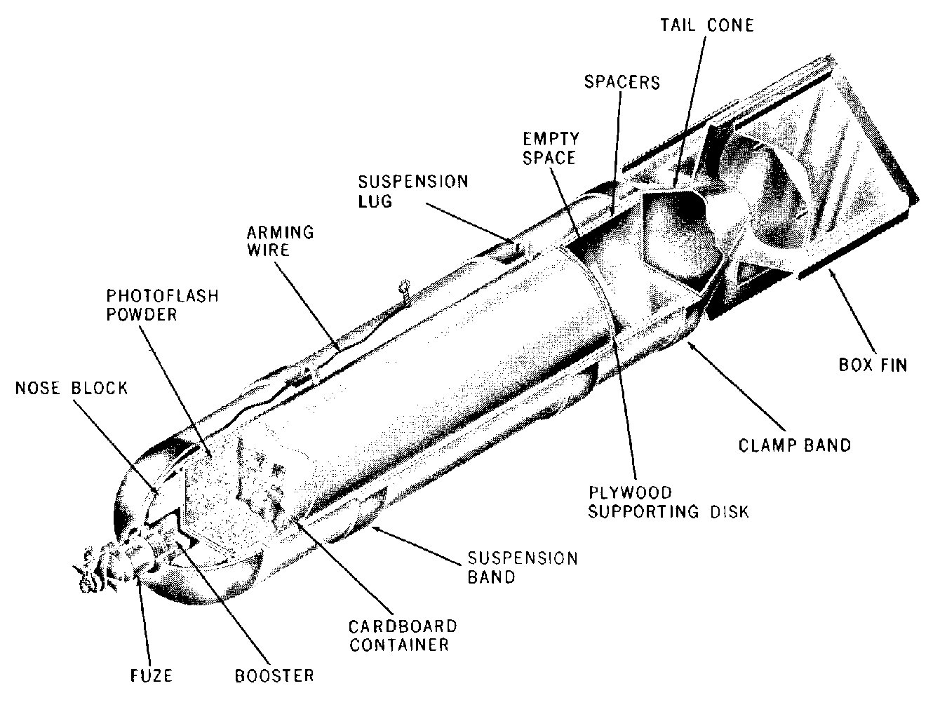 Amerykańska bomba fotograficzna AN-M46